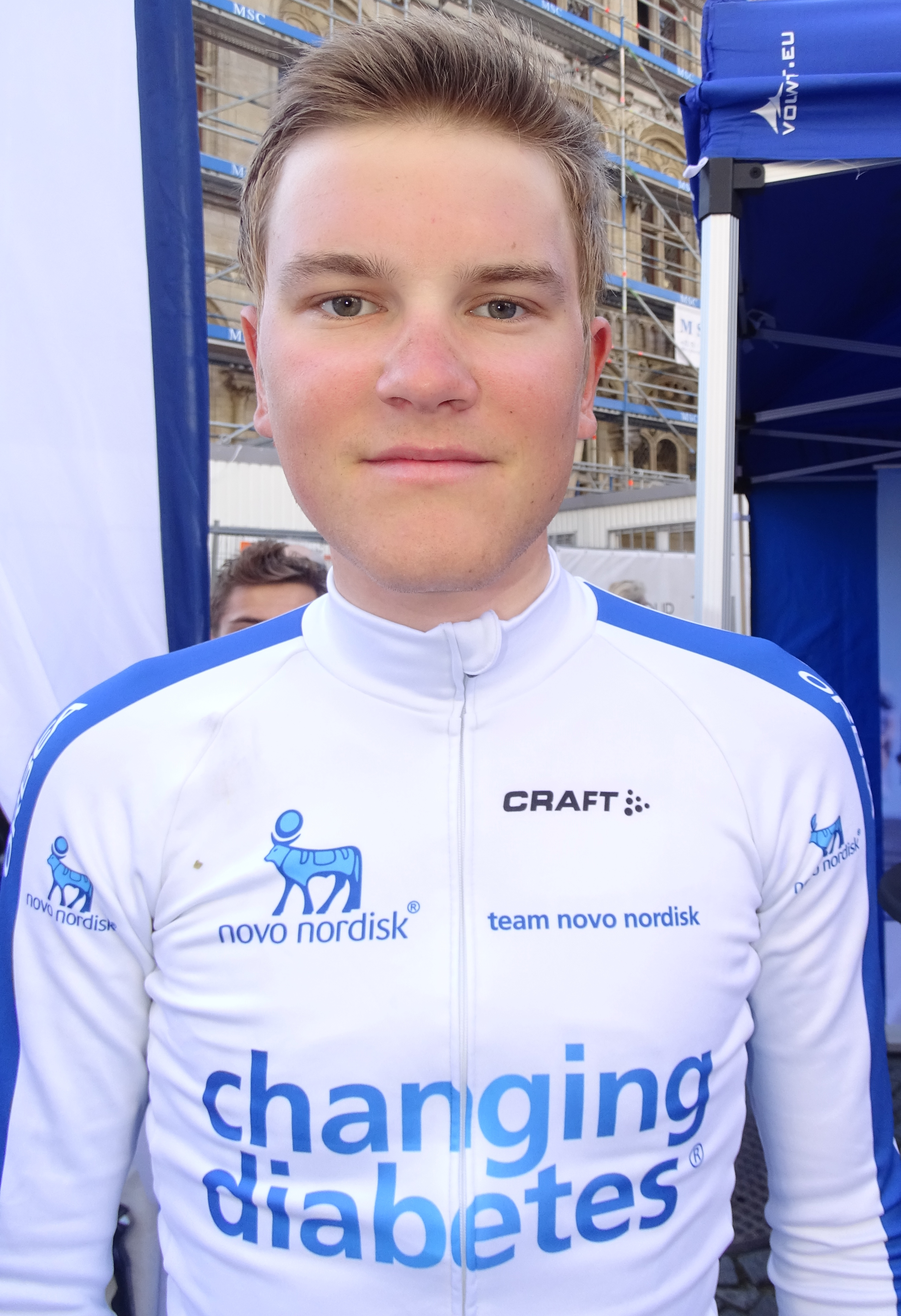 Reportage réalisé le mercredi 15 avril à l'occasion du départ de la Flèche brabançonne 2015 à Louvain, Belgique.